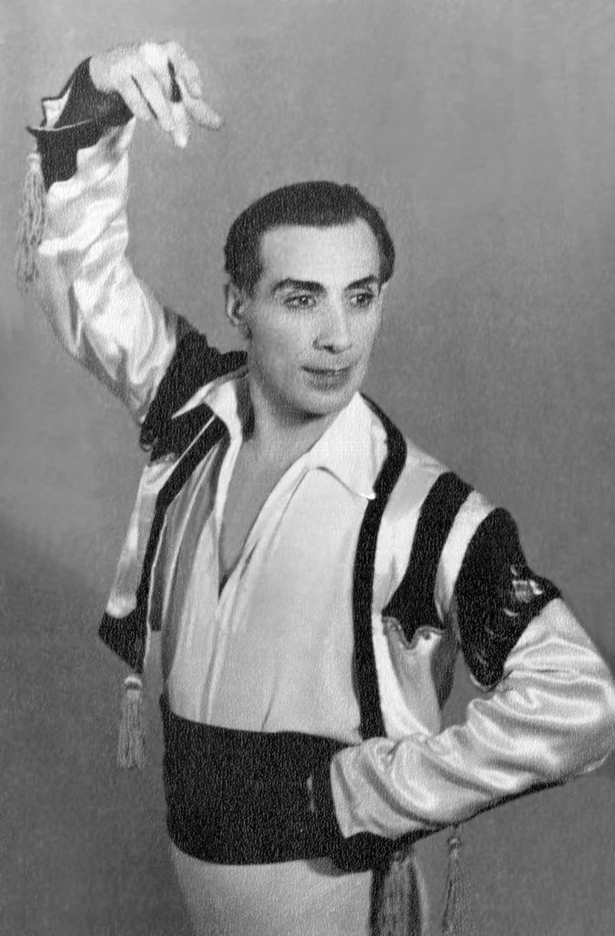 Саркисян Саркис в роли Базиля (балет Дон Кихот)